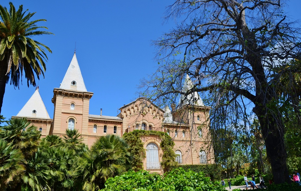 Parc Samà (Cambrils)